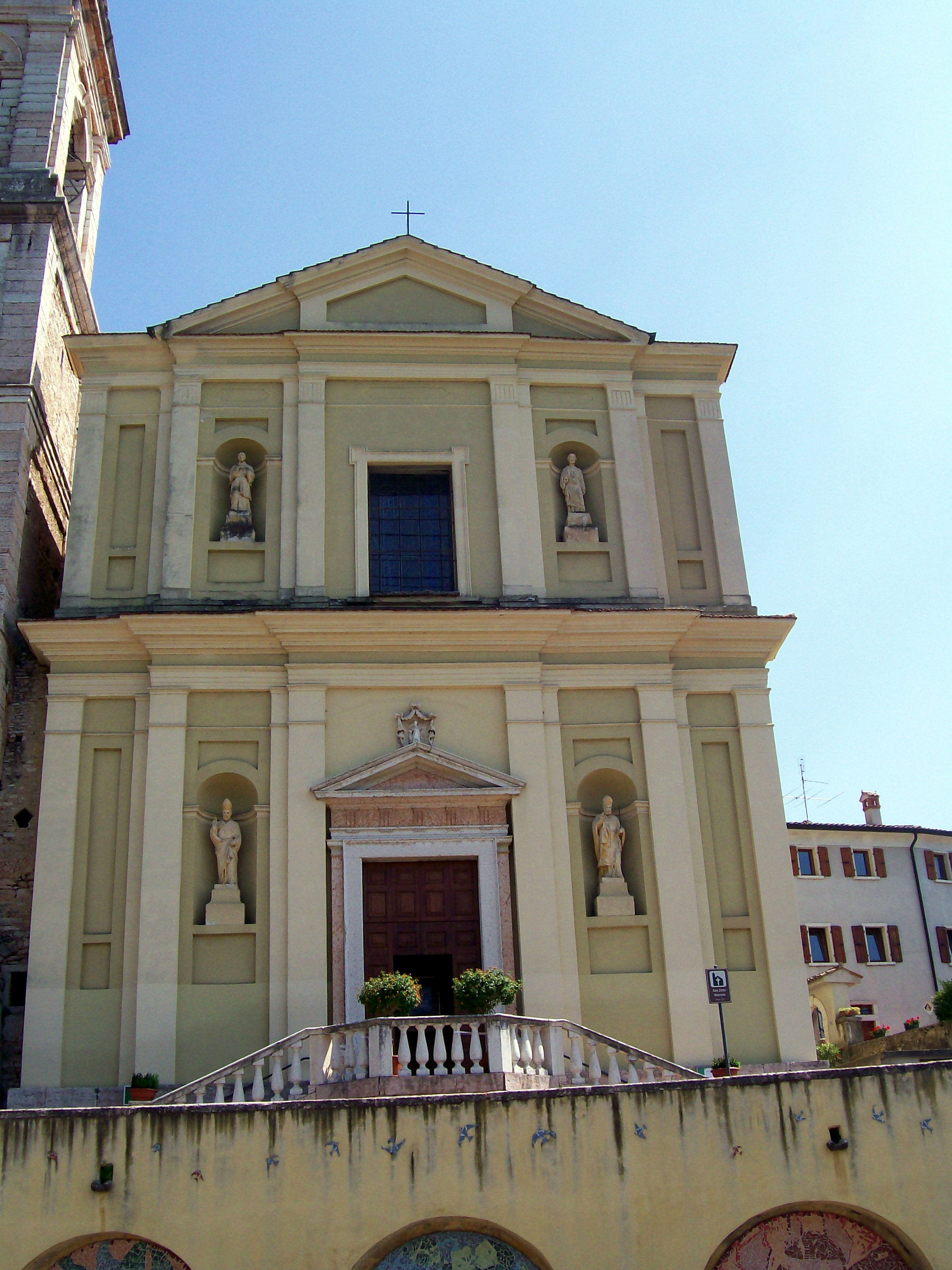 Facciata della chiesa parrocchiale di San Zeno Vescovo in San Zeno di Montagna (VR)